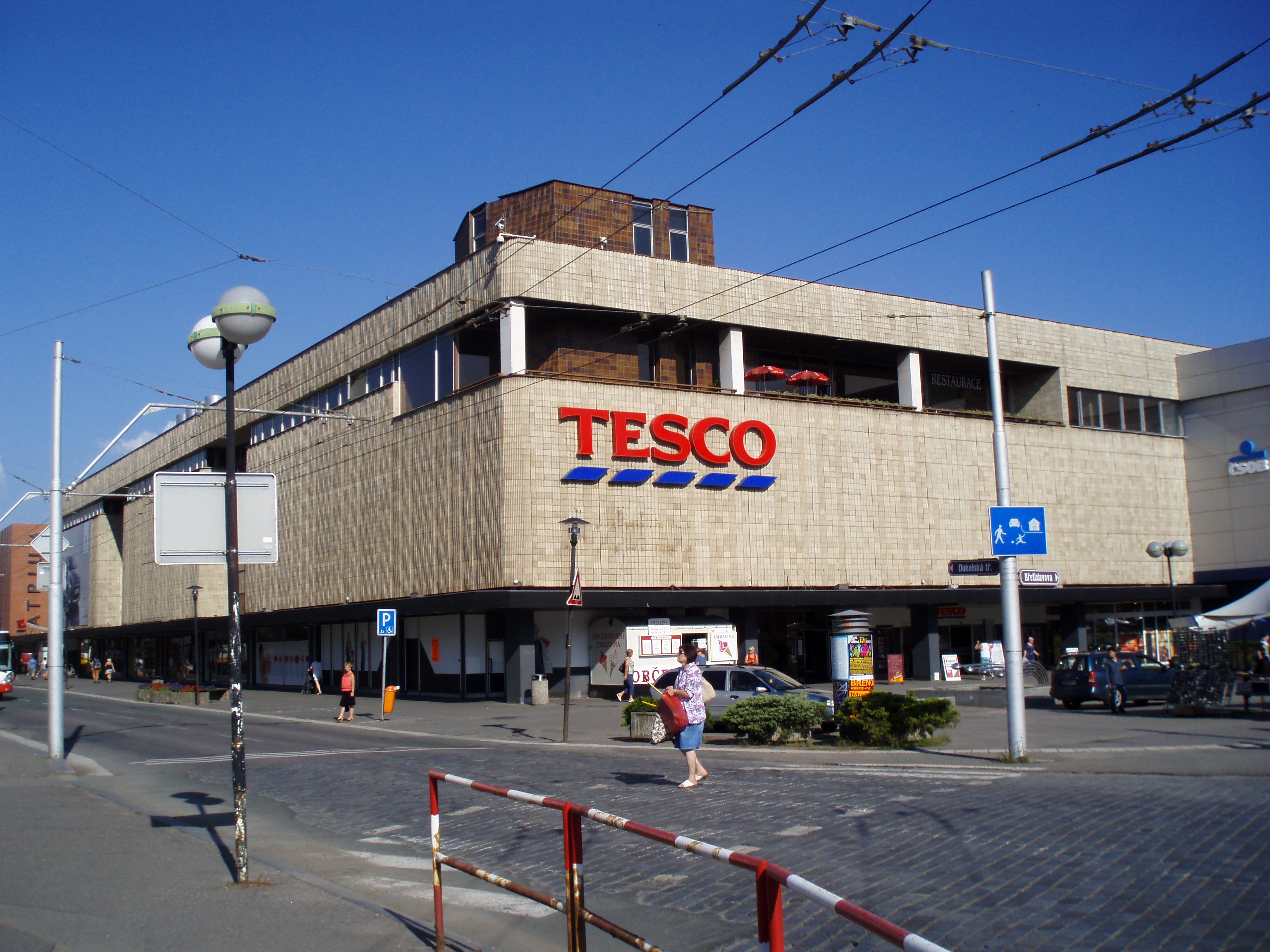 Obchodní dům TESCO (Hradec Králové, náměstí 28. října 1610/1)